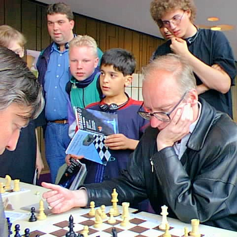 Anatoli Karpow und Robert Hübner analysieren ihre Partie, umdrängt von Kiebitzen bei den Dortmunder Schachtagen 1997.